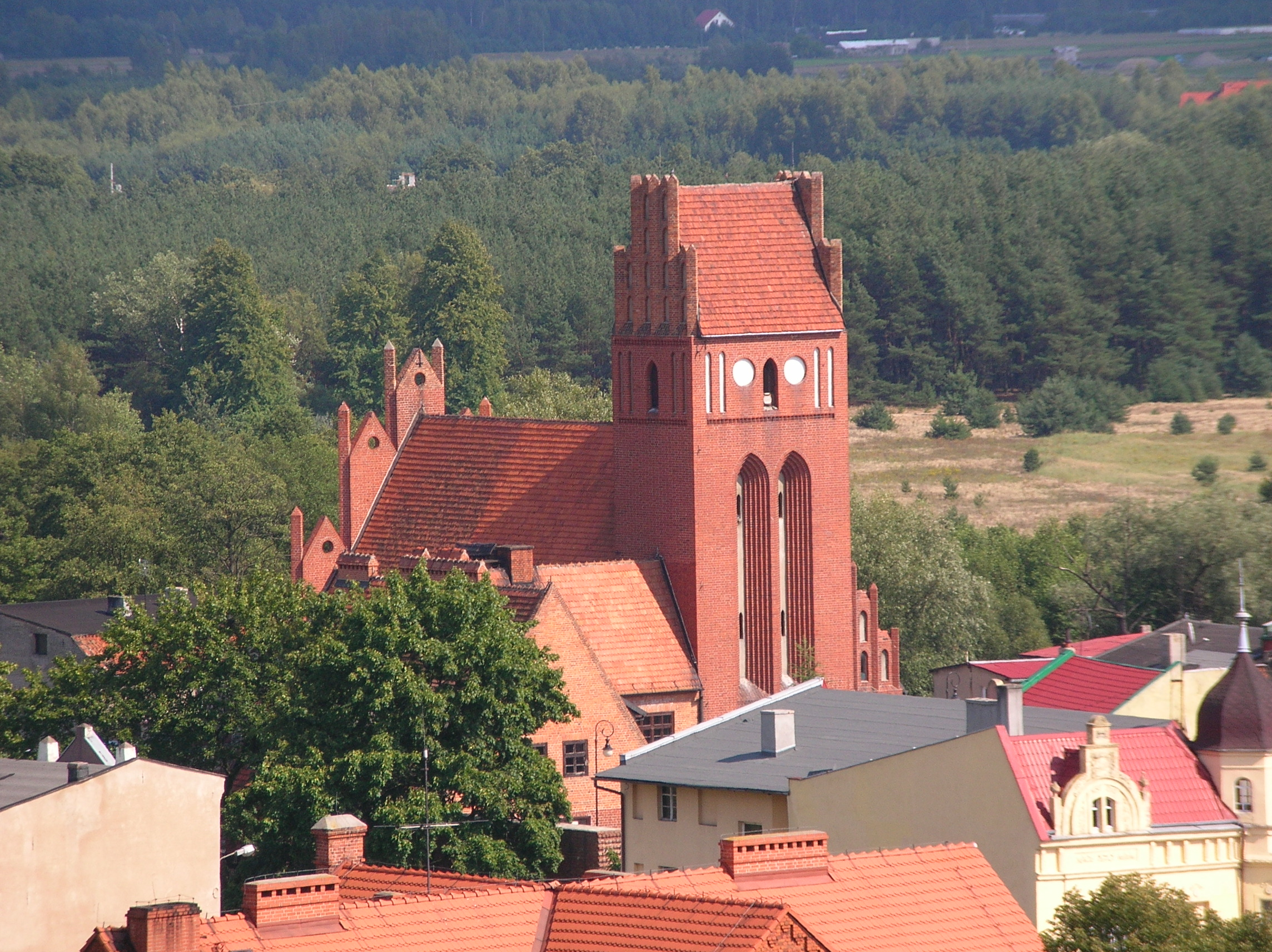 church in Golub Dobrzyń, 1909